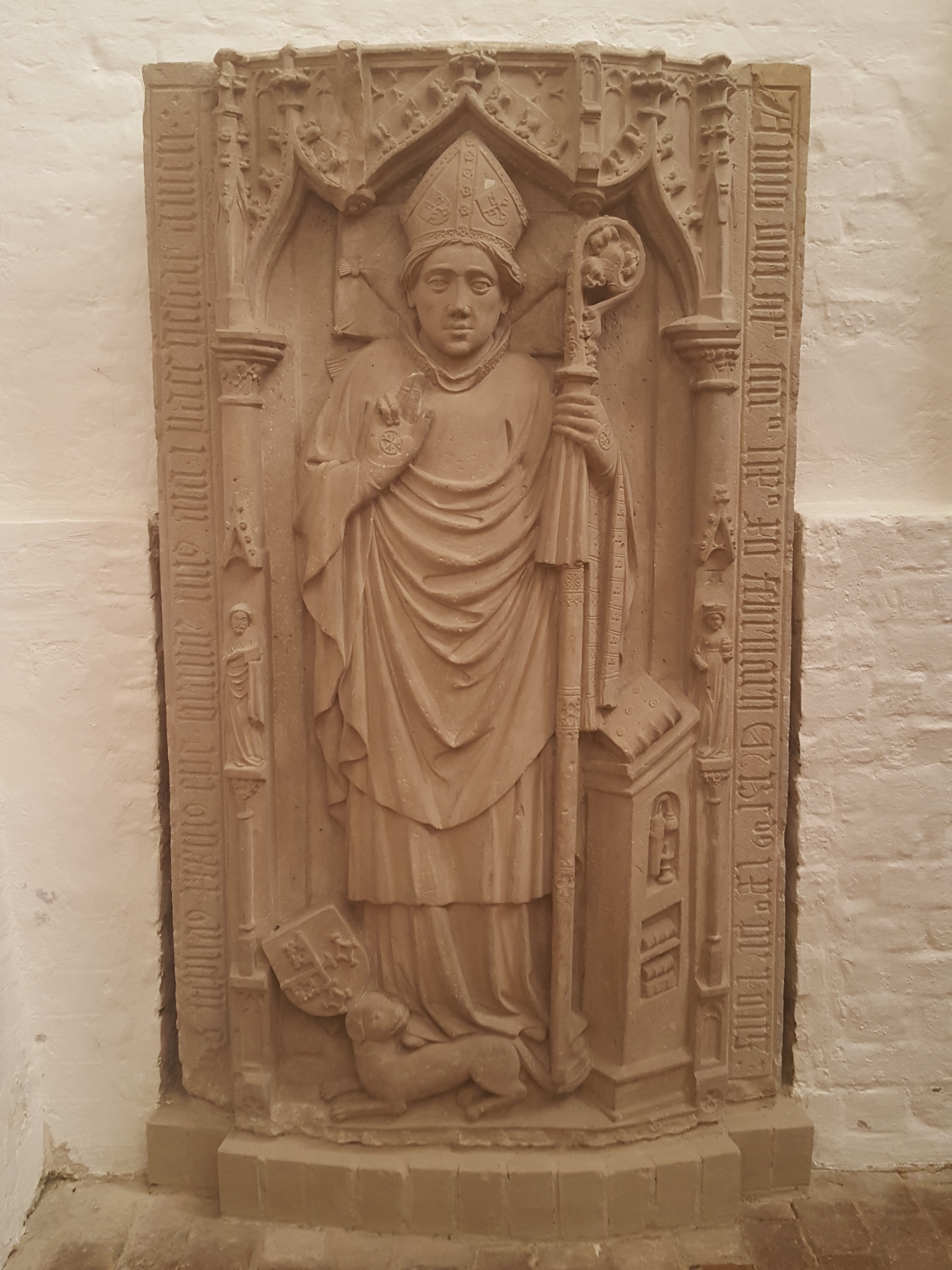 Stephan Bodecker, Grabplatte für Bischof Stephan in Dom zu Brandenburg, Künstler unbekannt